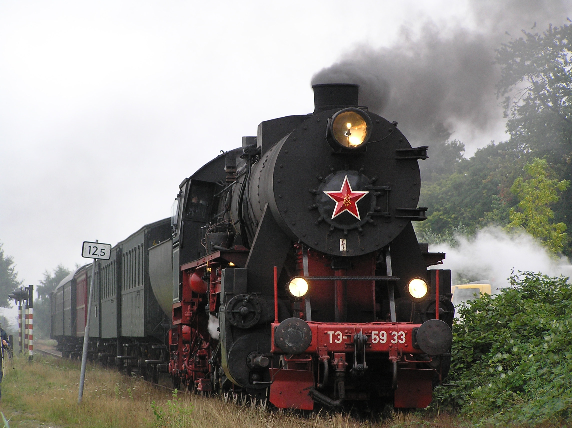 TЭ 5933 bei Star in den Niederlanden.